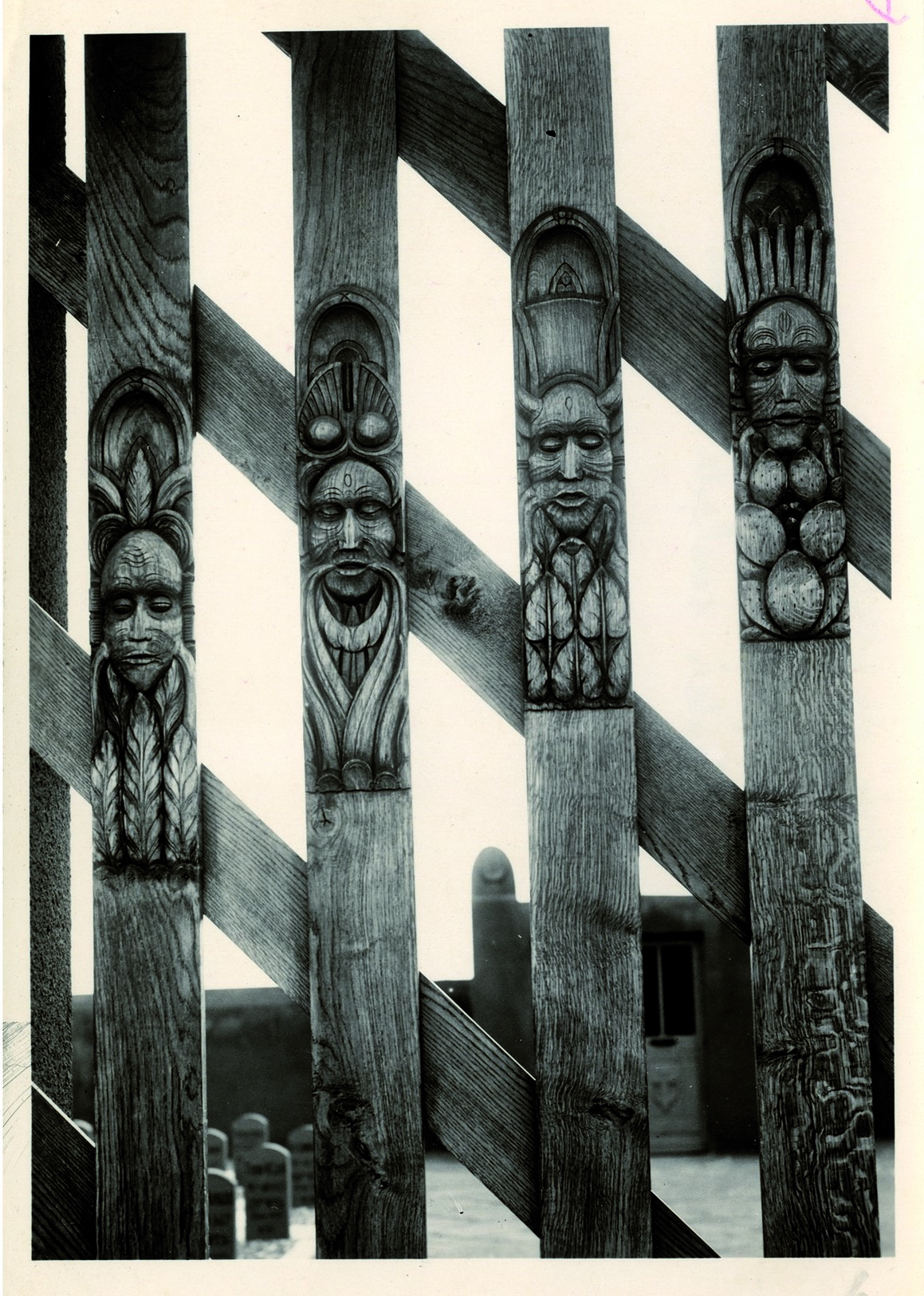 ADRML, 437 W 173